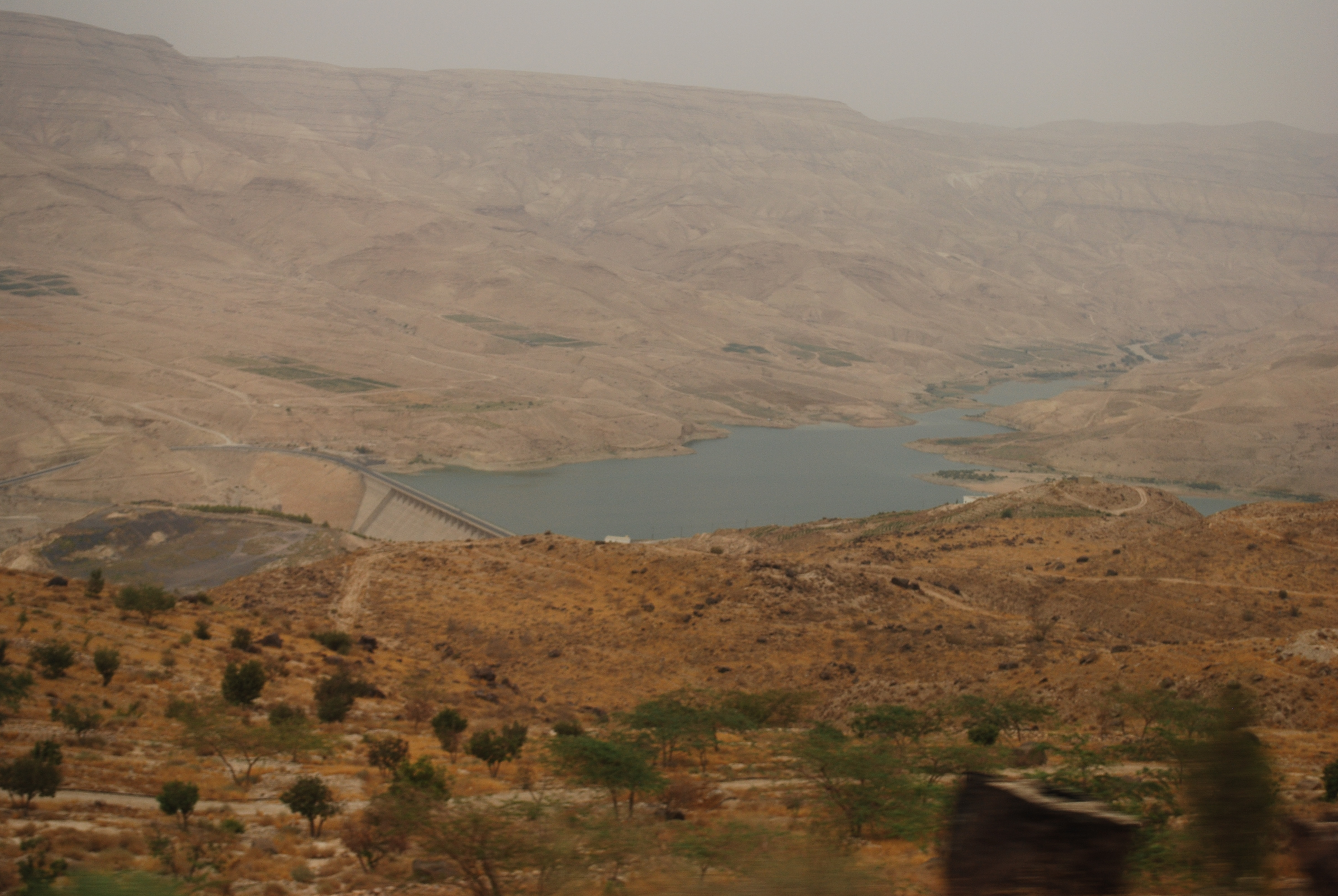 Belvédère sur le versant nord du Wadi Mujib.